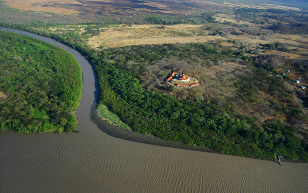 Vista Panorámica de Rancho Humo